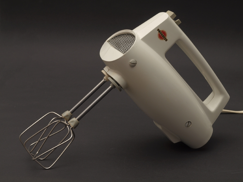 Progress Handrührgerät (Mixer) Typ 663-K11. 140VA, KB 8 min.